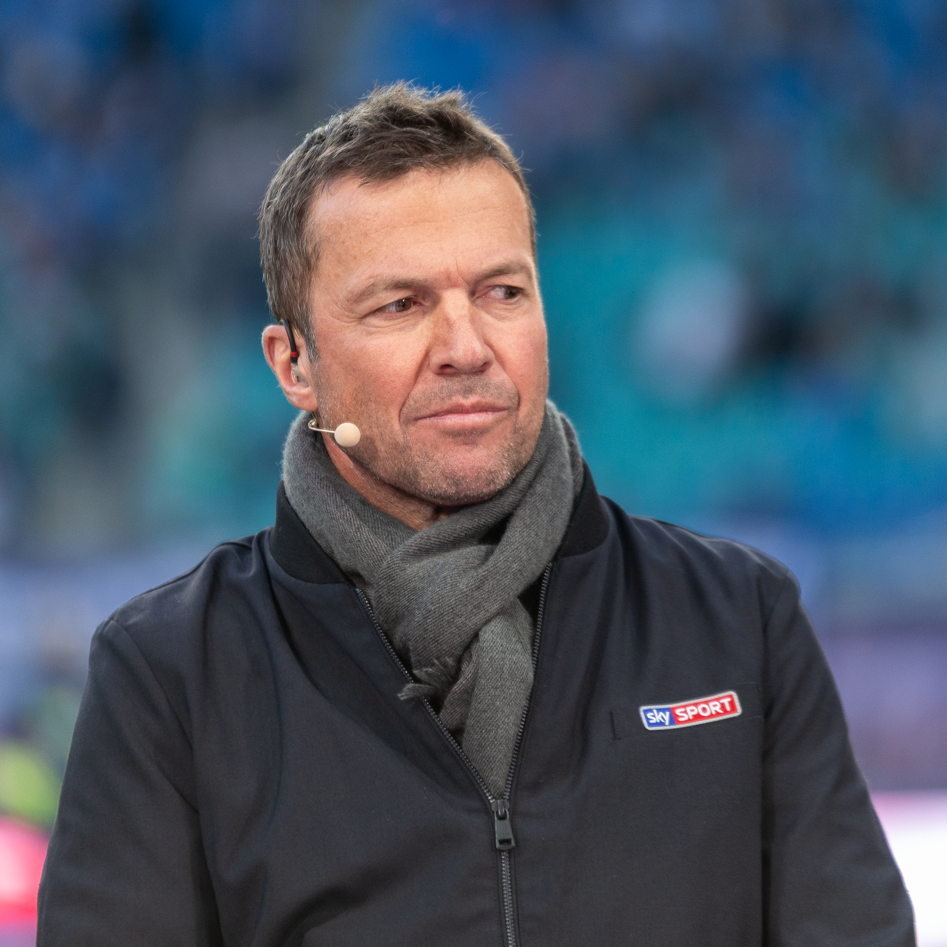 Fußball, Männer, 1. Bundesliga, RB Leipzig - Hertha BSC; Lothar Matthäus; Porträt, Einzelbild